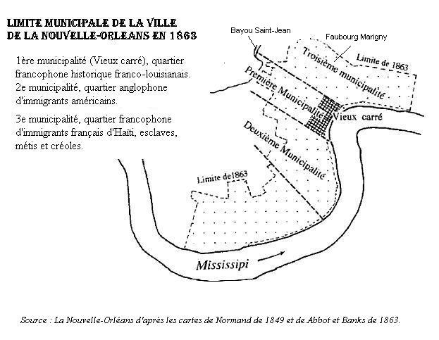 Carte des limites de la ville de La Nouvelle-Orléans en 1863 avec ses trois municipalités d'après cartes historiques de cette époque.